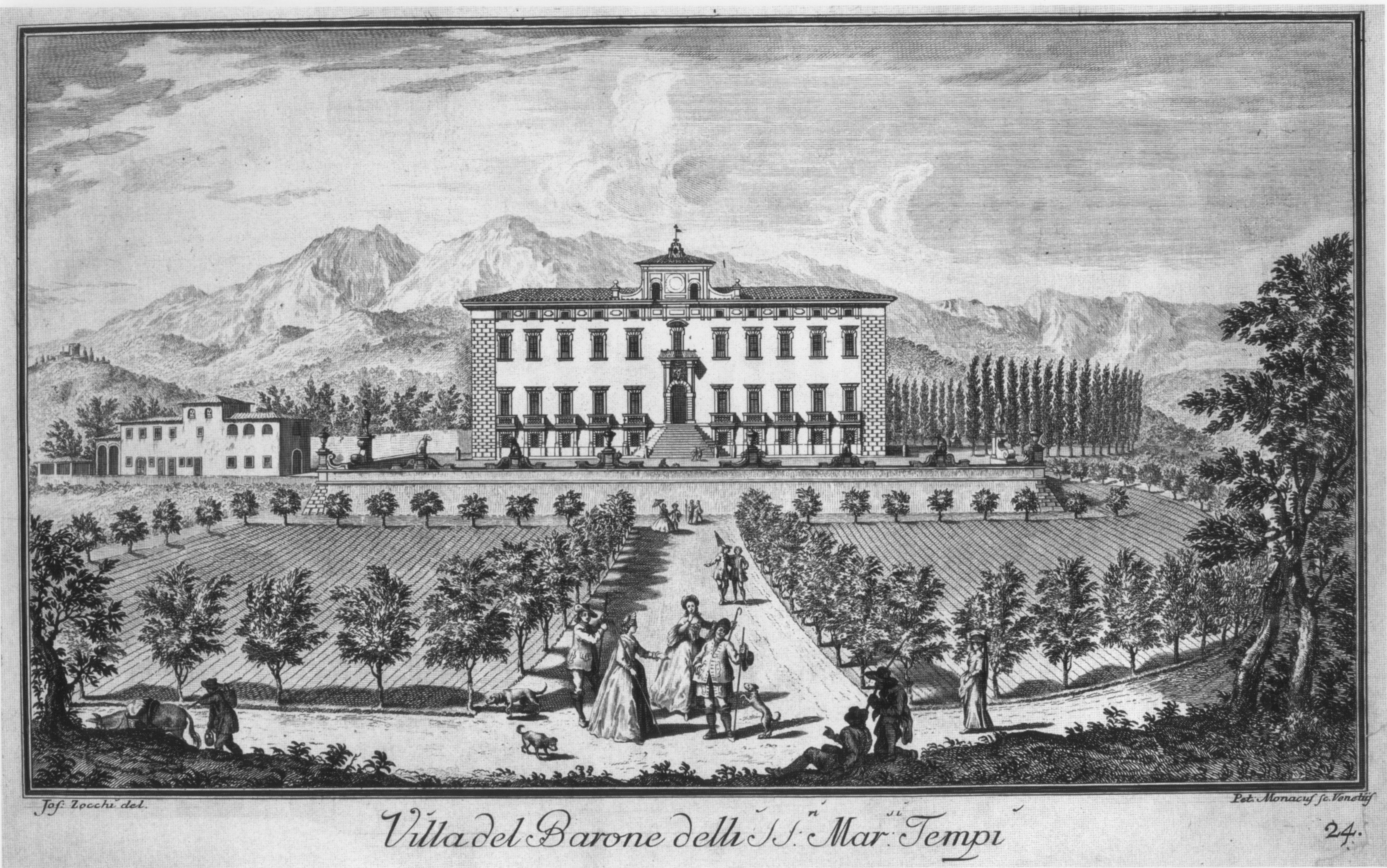 Zocchi, ville 26 barone